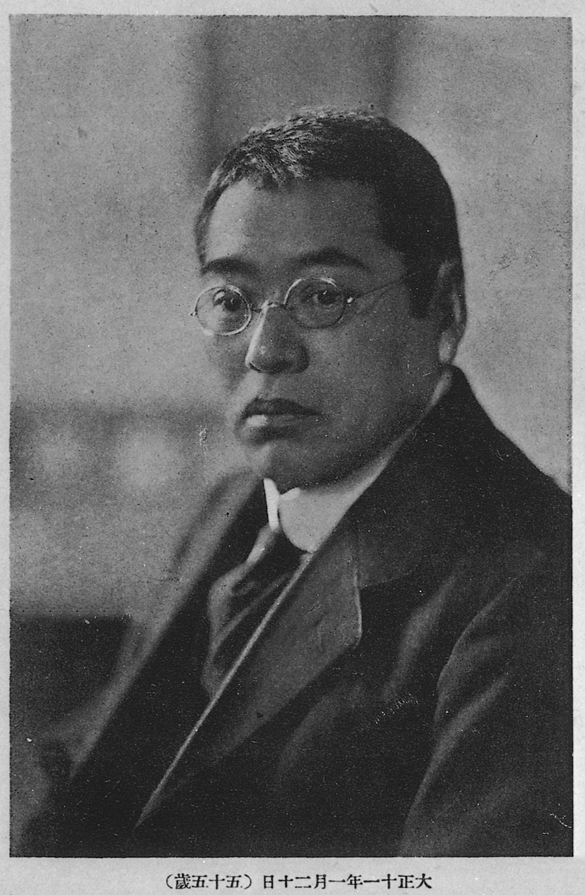 Portrait of Tokutomi Roka (徳冨蘆花, 1868 – 1927)